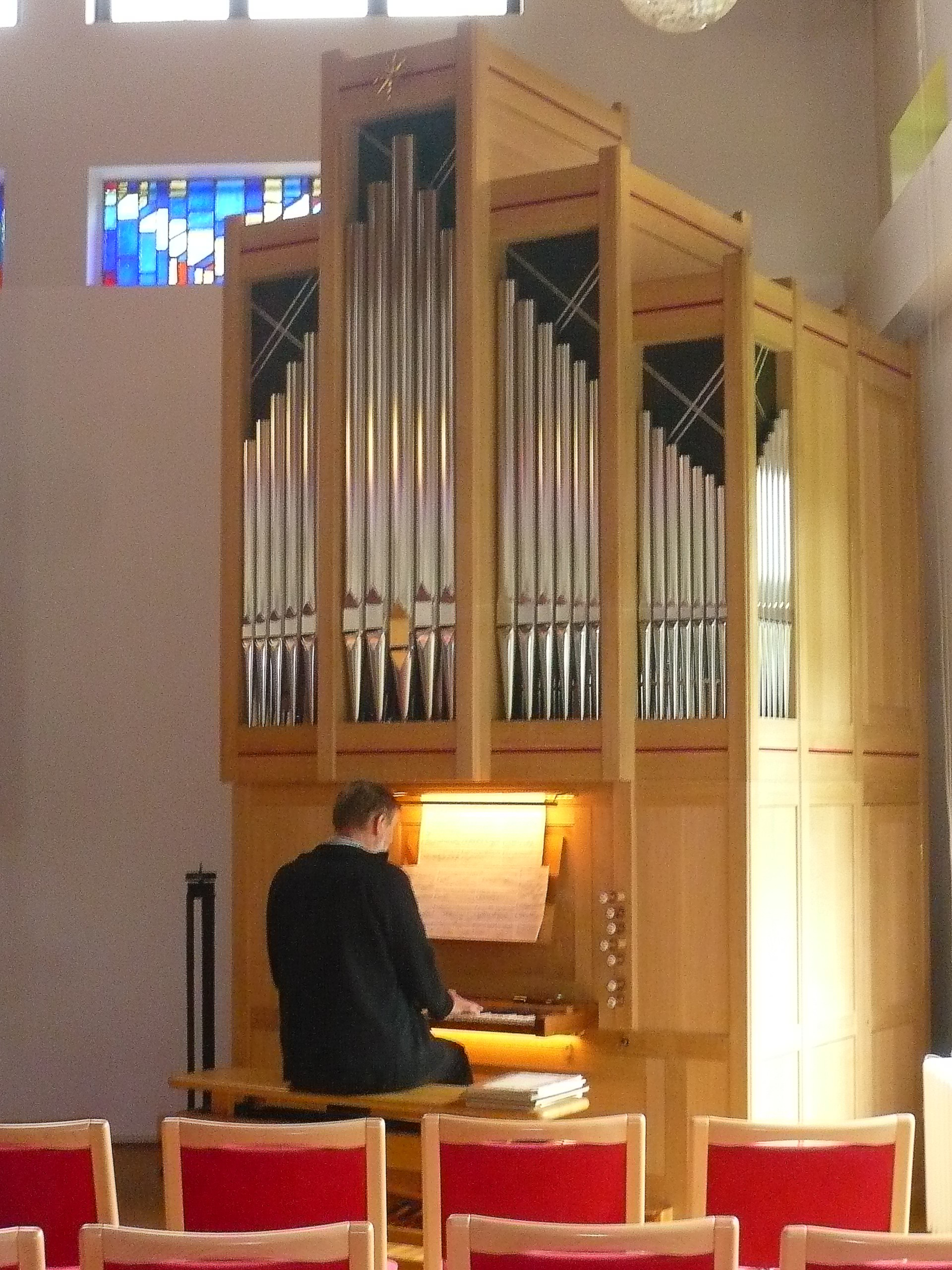 Berlin-Biesdorf, Versöhnungskirche, Orgel